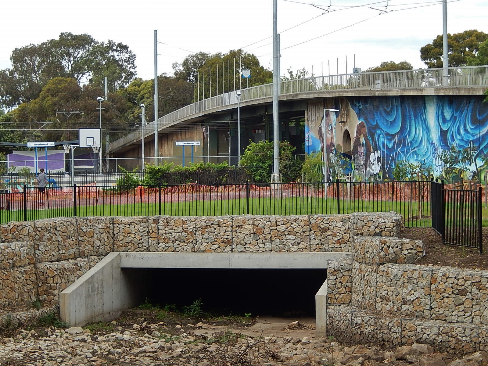 Goodwood tram bridge